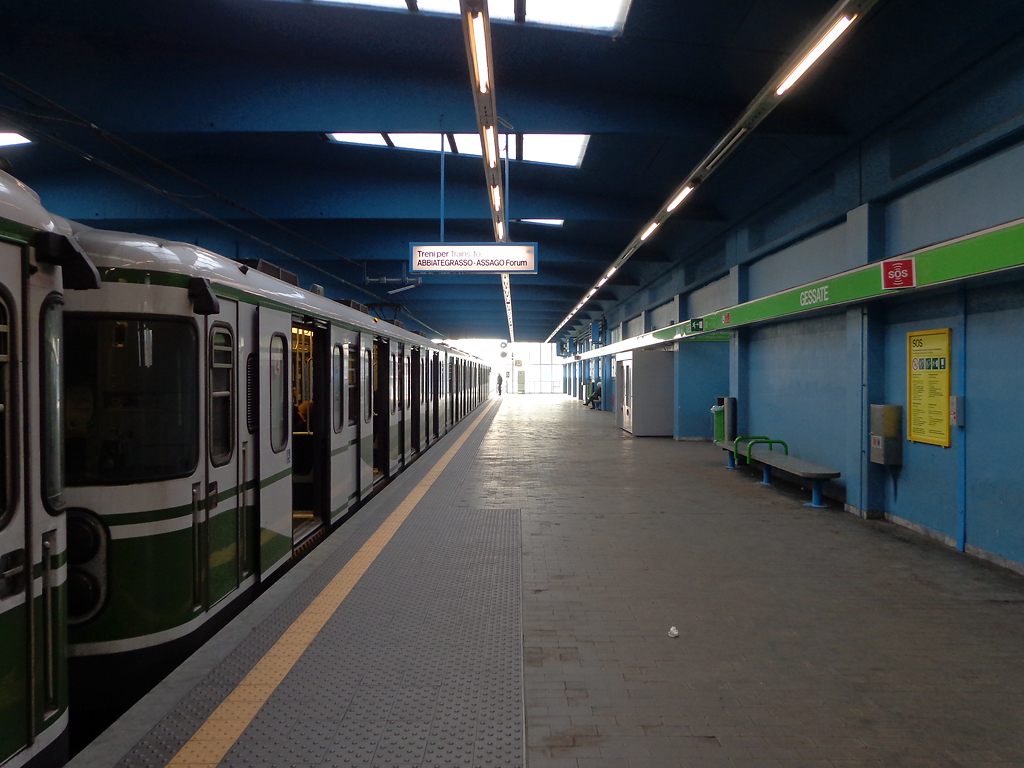 Stazione di Gessate della metropolitana di Milano